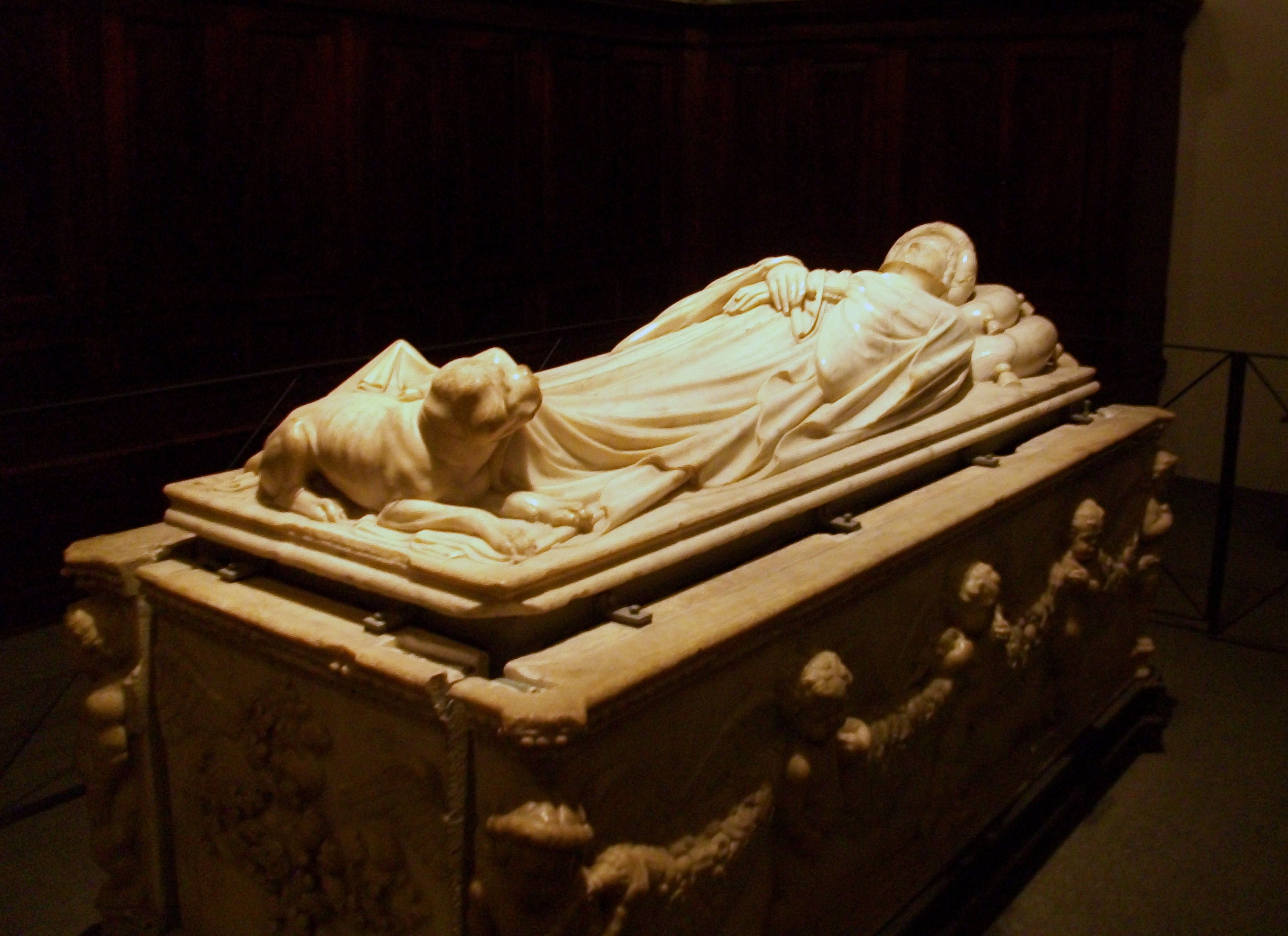 Monument funebre a Ilaria del Carretto.